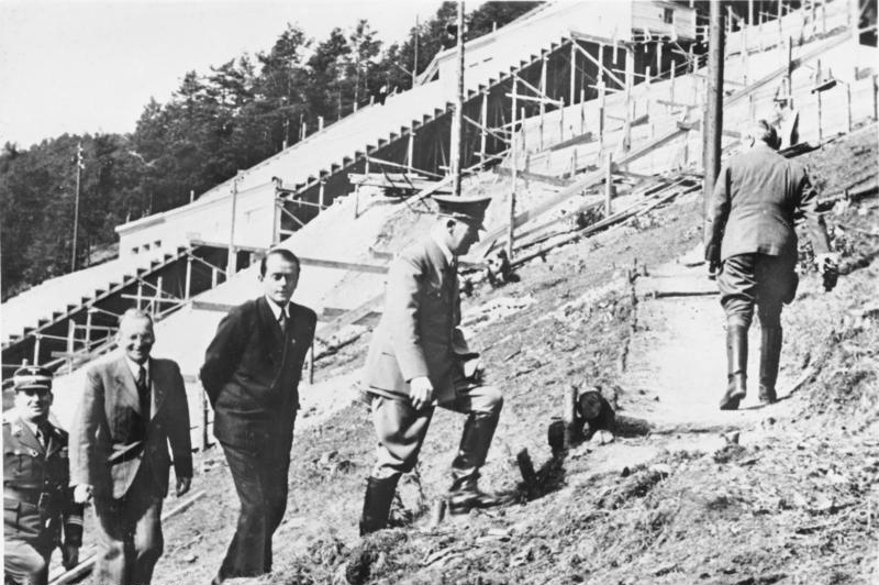 Nürnberg, deutsches Stadion, Hitler Vom Besuch des Führers in Nürnberg. Am Montag weilte der Führer in Nürnberg, um sich von dem Fortgang der Bauarbeiten auf dem Reichsparteitagsgelände zu überzeugen. Dabei besichtigte der Führer [Adolf Hitler] auch das im Hirschbachtal in der Hersbrucker Schweiz errichtete Teilmodell des deutschen Stadions, das einen nachhaltigen Eindruck von dem gewaltigen später auf dem Reichsparteitagsgelände entstehenden grössten Stadions der Welt vermittelt. Dabei wurde diese Aufnahme gemacht, hinter dem Führer sieht man den Architekten des Stadions Generalbauinspektor Prof. Albert Speer und (ganz links) Oberbürgermeister [Willy] Liebel - Nürnberg. Scherl Bilderdienst, Berlin 22.3.38 Abgebildete Personen: Hitler, Adolf: Reichskanzler, Deutschland Speer, Albert Prof. Dr.: Reichsminister für Rüstung und Kriegsproduktion, Architekt, Deutschland (GND 118615998) Liebel, Willy: Oberbürgermeister von Nürnberg, Deutschland (GND 116987448)